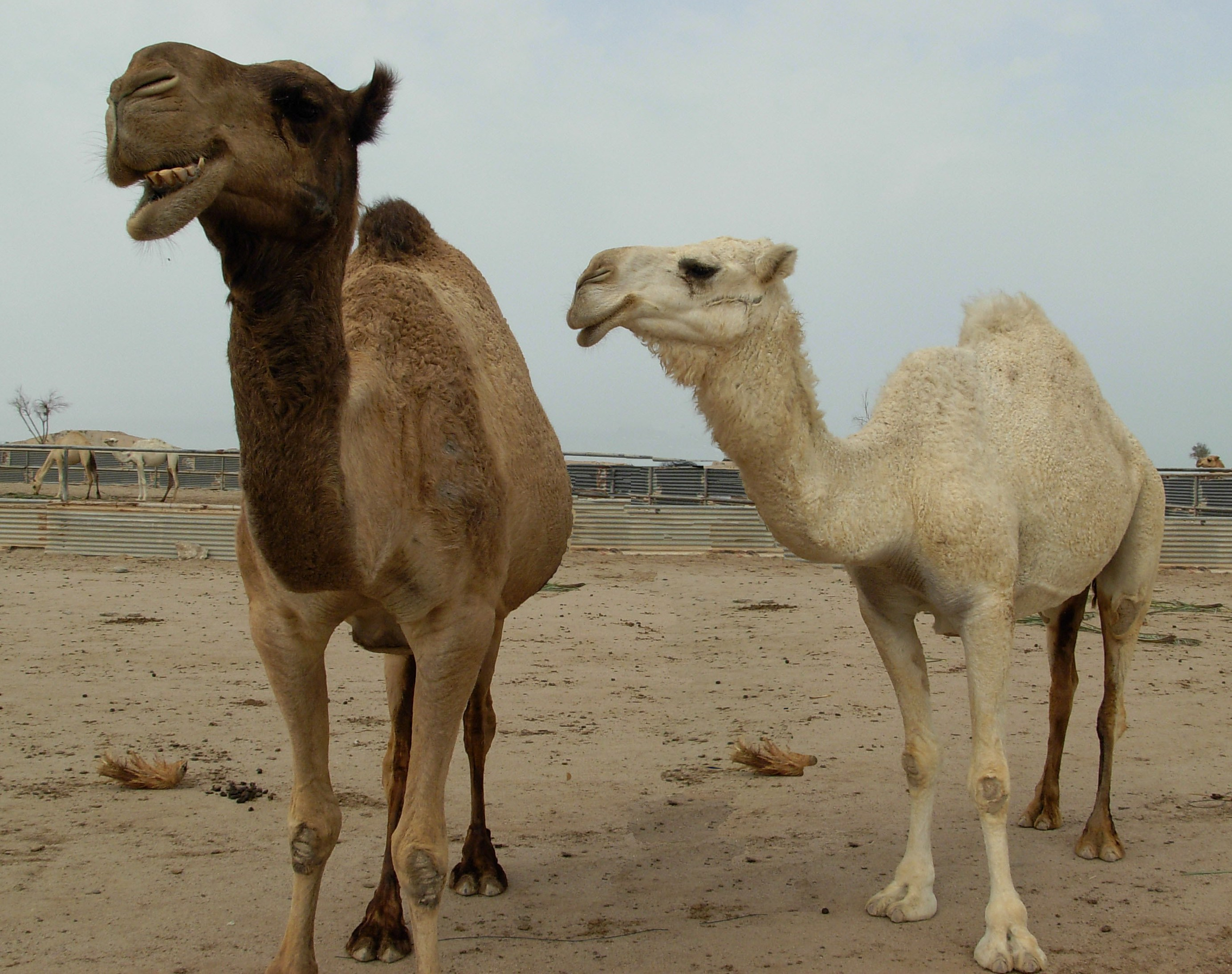 കുവൈറ്റിലെ ഫയിലക്ക ദ്വീപിൽ നിന്നും.